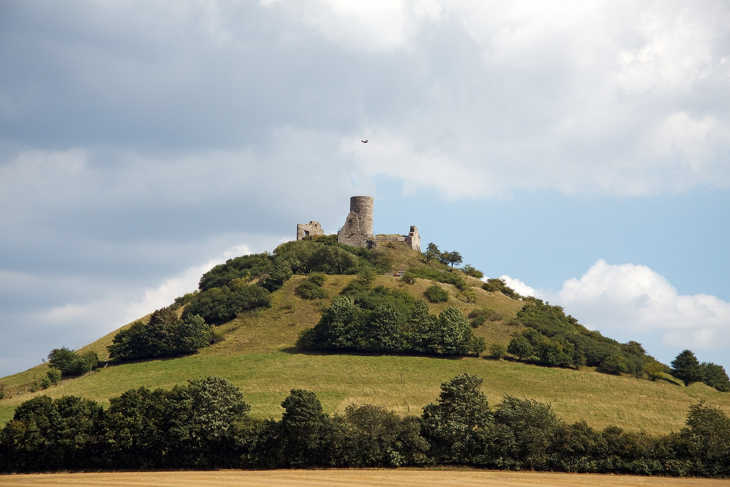 Desenberg mit Burgruine Desenberg, Warburg, Warburger Börde, Nordrhein-Westfalen, Deutschland